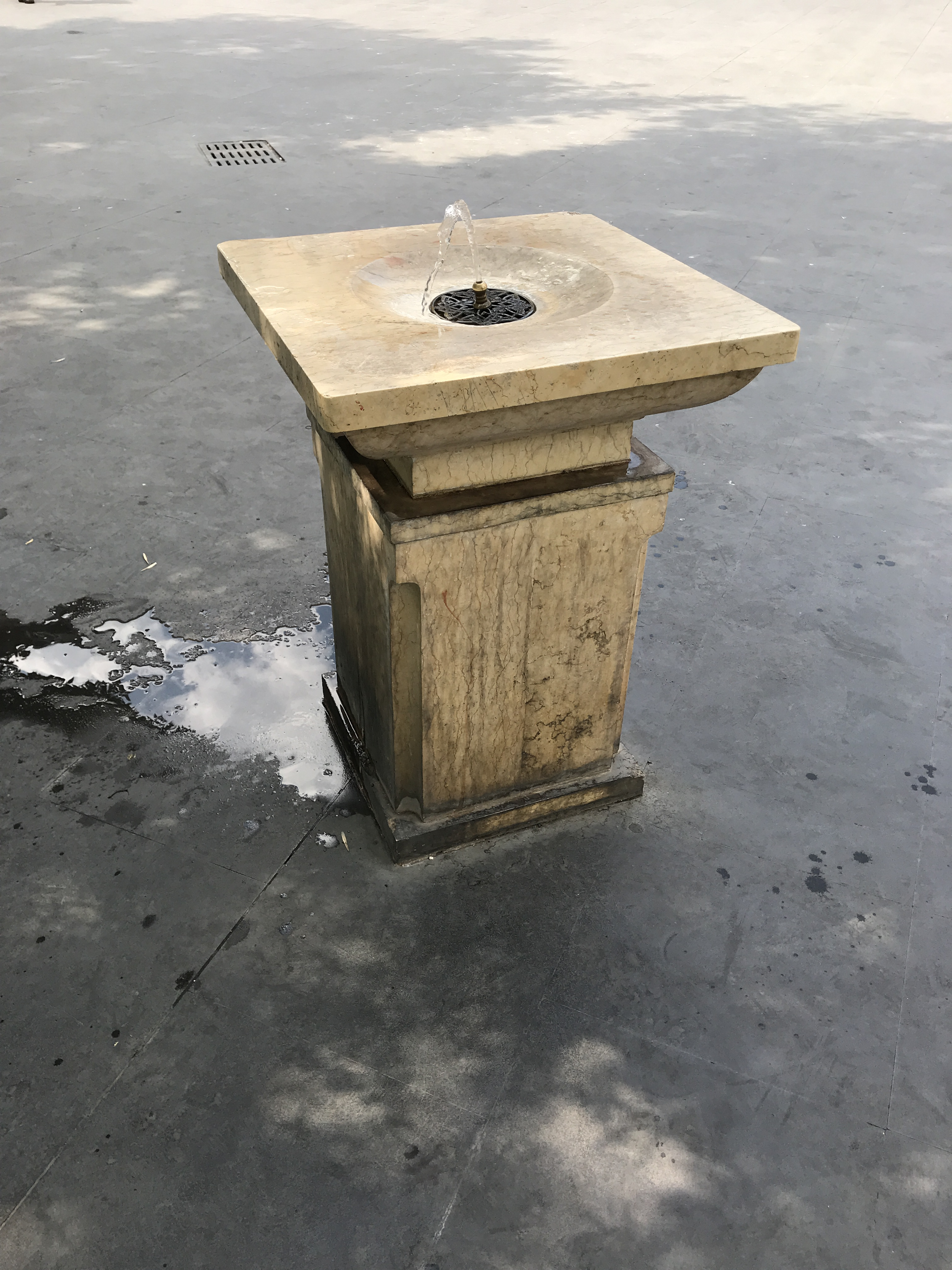 Ереван, Армения, July 2019